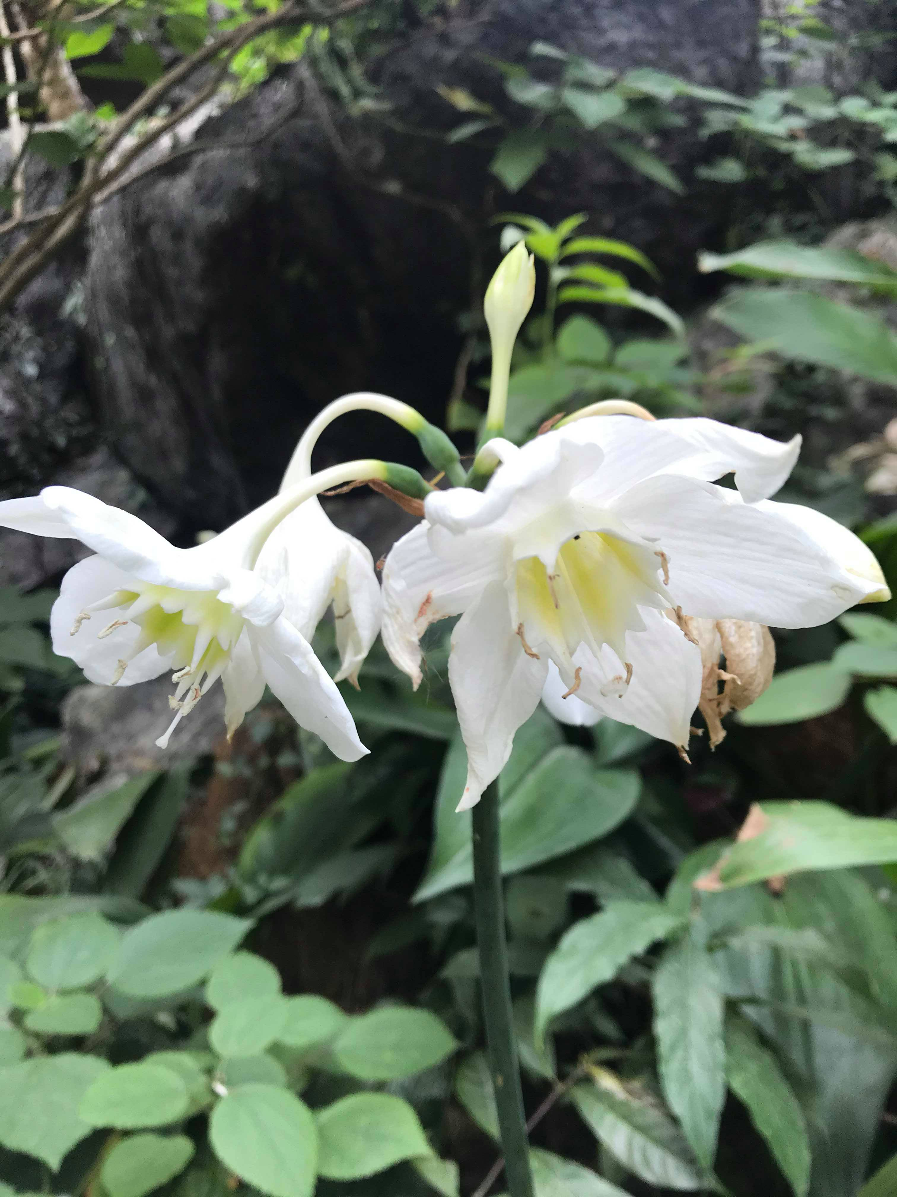 Hoa ngọc trâm tượng trưng cho sự trong trắng, thuần khiết.